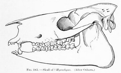 Skull of Hyrachyus